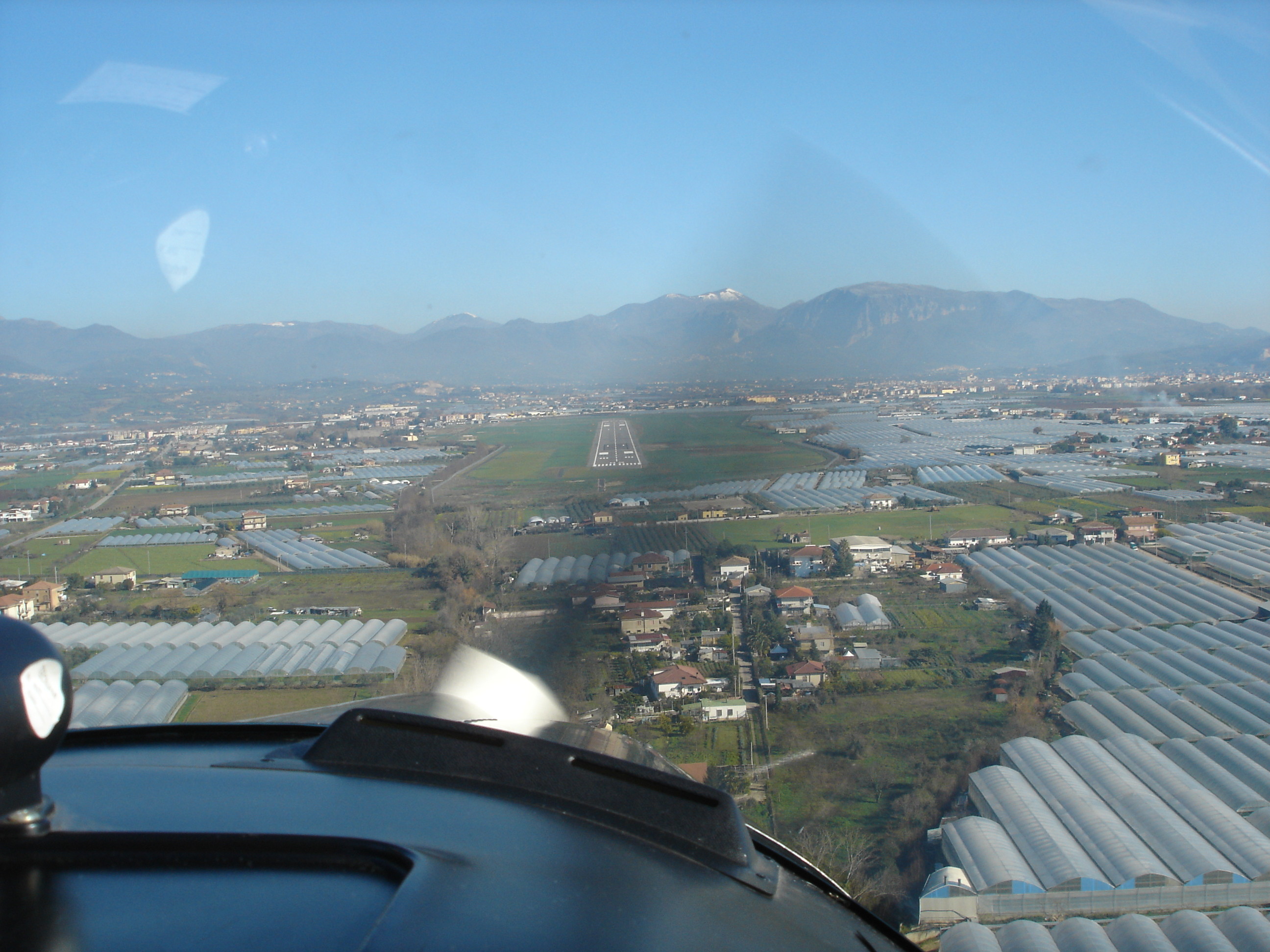 20 gennaio 2008: volo Salerno Pontecagnano (LIRI)-aviosuperficie di Sabaudia a bordo del Tecnam P2002 I-FADA